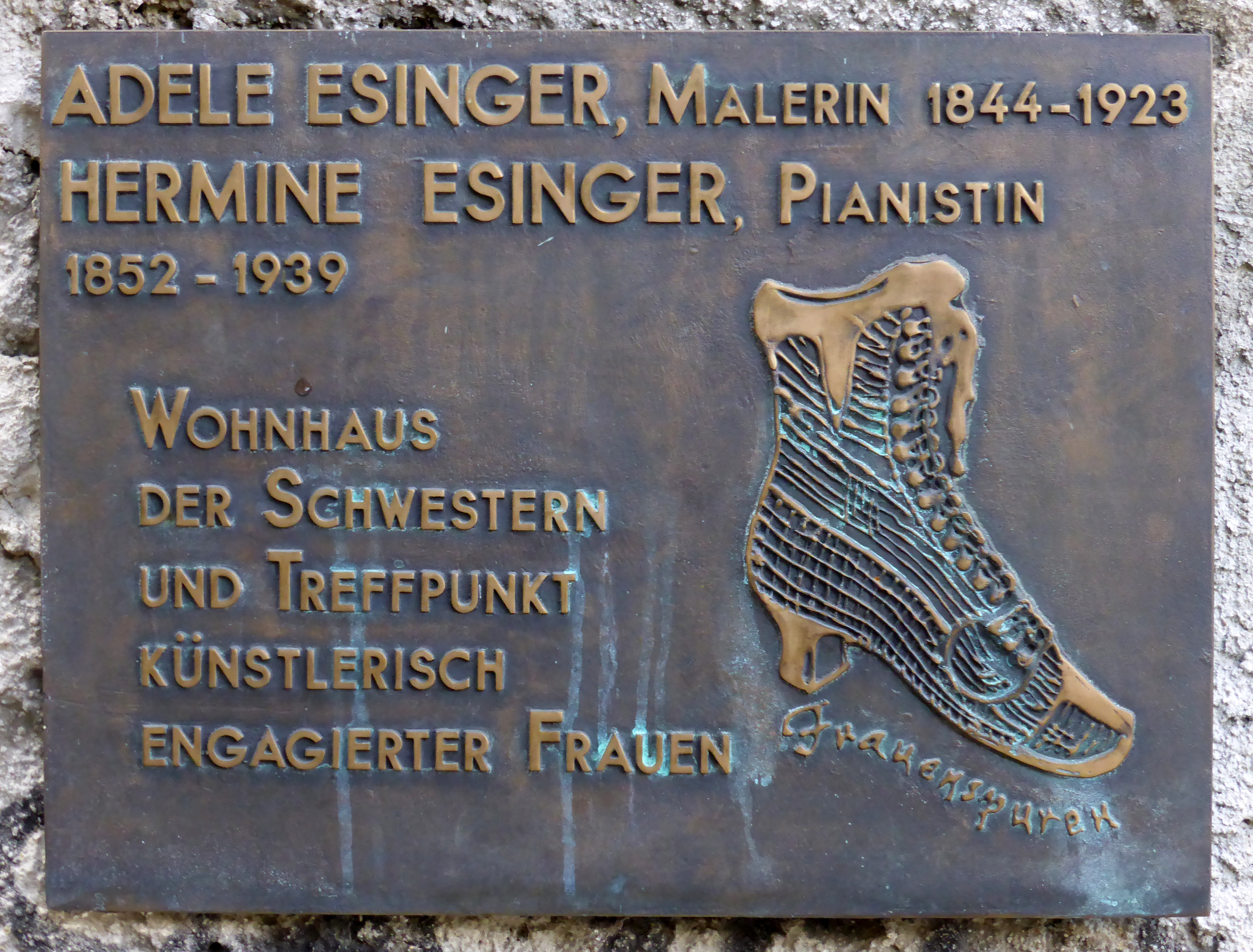 Mayerhaus am Mönchsberg, Salzburg. Gedenktafel (Frauenspuren) - Adele und Hermine Esinger.